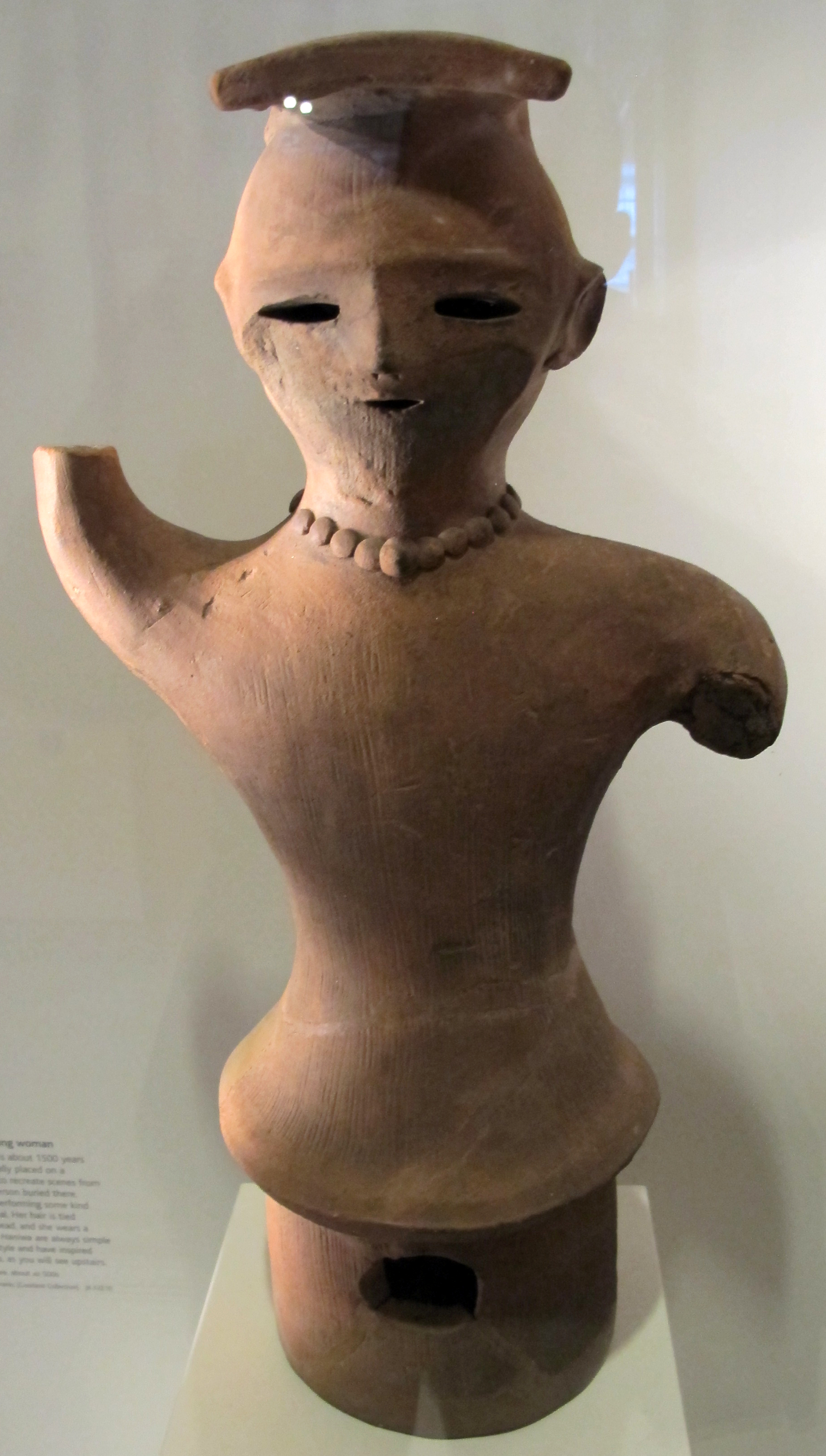 Haniwa con donna che fa danza rituale, V sec